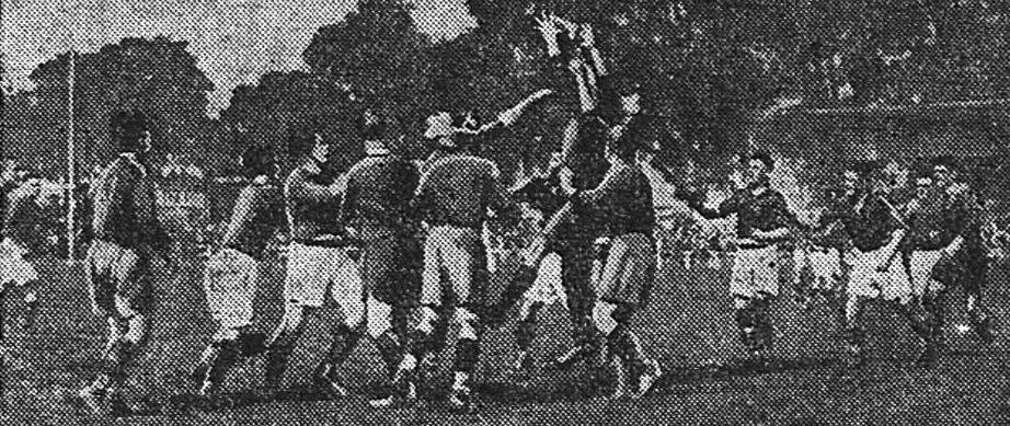 1927 (29 mai), une touche disputée lors de la finale du championnat de France de rugby.